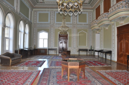 Ekspozisiya zalı